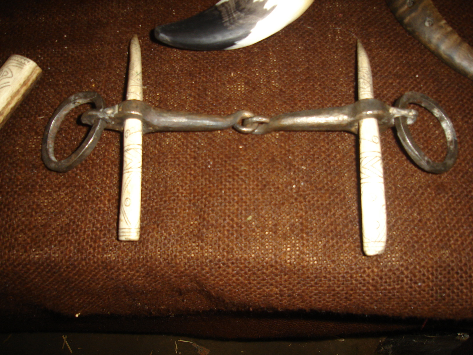 Rekonstrukcja fragmentów uprzęży końskiej z osady w Biskupinie.